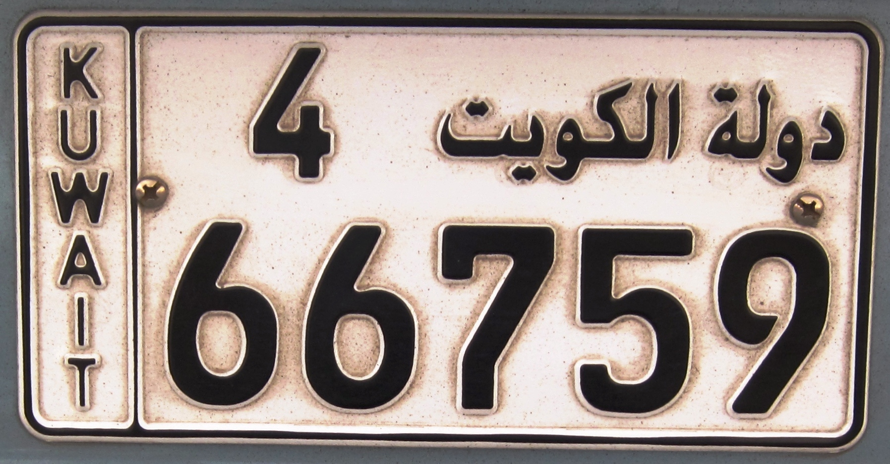 kentekenplaat Koeweit